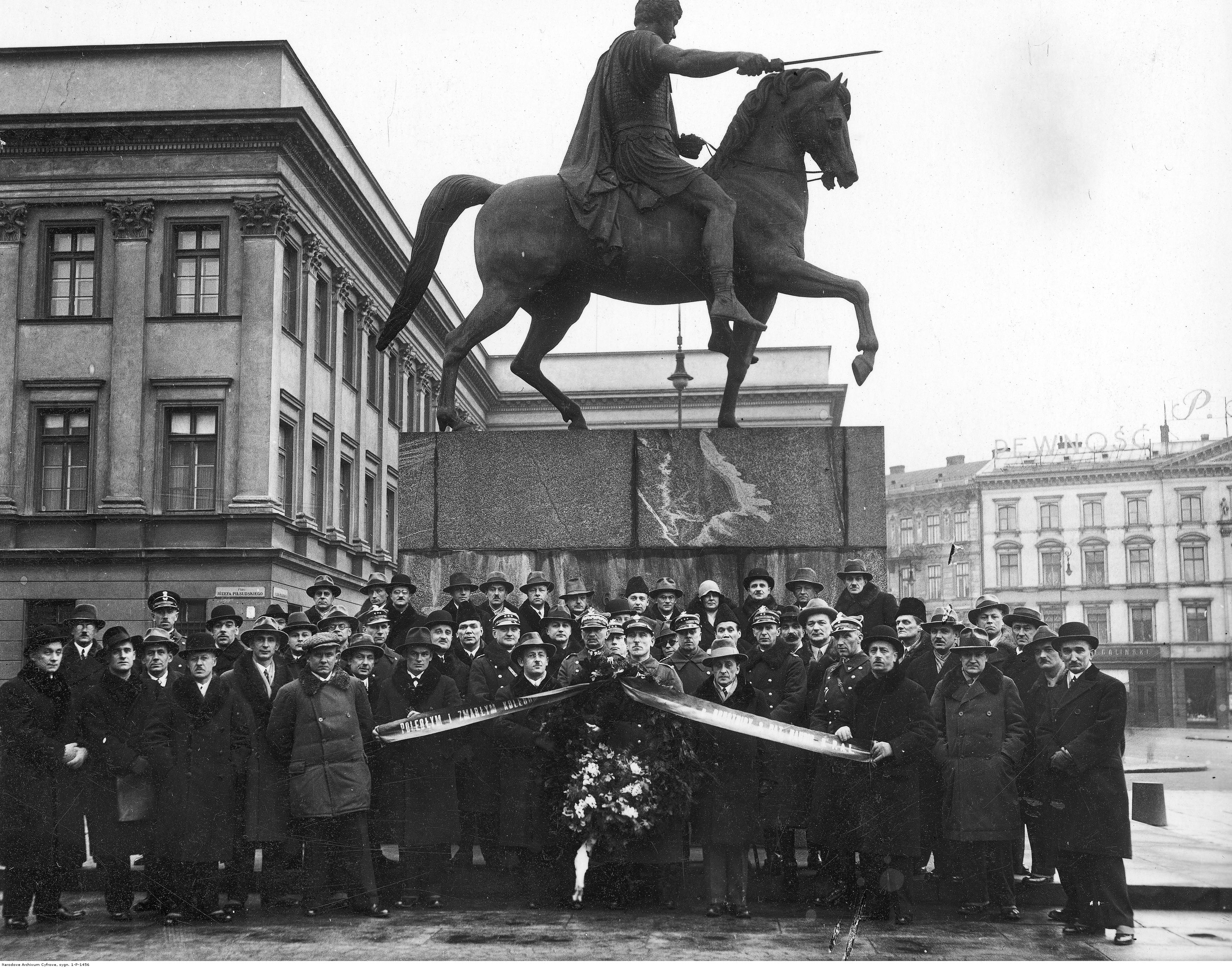 Zjazd koleżeński w Warszawie byłych ochotników 3 baterii haubic 8 Pułku Artylerii Lekkiej, uczestników wojny 1918-1920, w lutym 1934 r. Uczestnicy zjazdu z wieńcem zebrani pod pomnikiem księcia Józefa Poniatowskiego przed wyruszeniem do Grobu Nieznanego Żołnierza. Koncern Ilustrowany Kurier Codzienny - Archiwum Ilustracji. Sygnatura: 1-P-1456